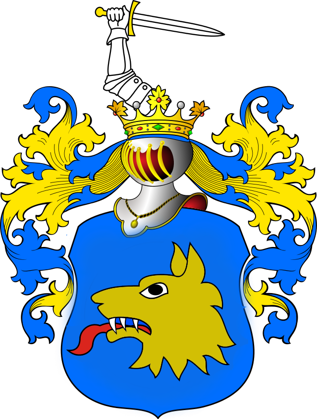 Wilcza Głowa 1772 r.